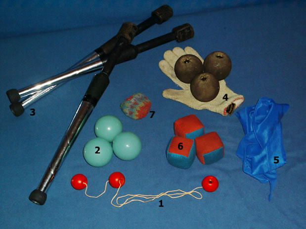 selbst fotagrafierte, eigene Jongliergeräte / Es zeigt in der Mitte einen Footbag und (im Uhrzeigersinn) Jonglierfackeln; entzündbare, hölzerne Bälle mit einem Keviarstrumpf als Überzug + Keviarhandschuhe; Jonglierwürfel; phosphoreszierende Jonglierbälle